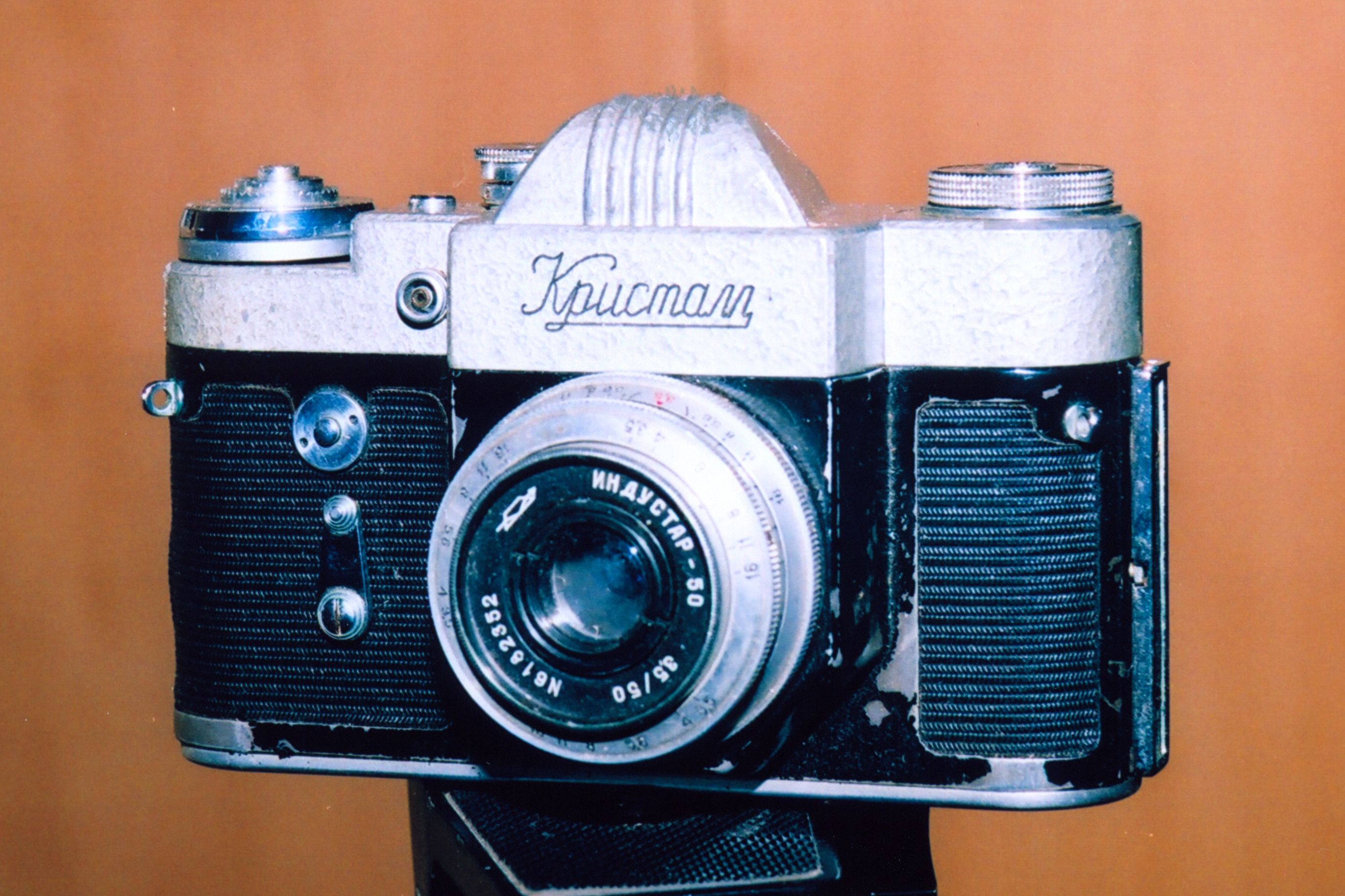 Фотоаппарат "Кристалл" с объективом "Индустар-50"